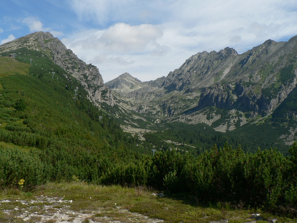 Pohled do Mlynické doliny od jihu.